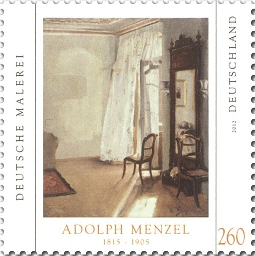 Serie Deutsche Malerei: Adolph Menzel- Das Balkonzimmer